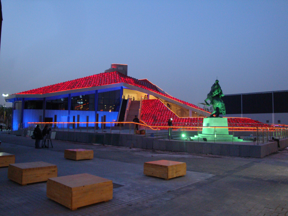 Pabellón de Venezuela en la Expo Shanghai 2010